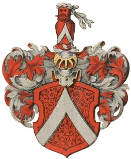 Baumgarteni suguvõsa aadlivapp